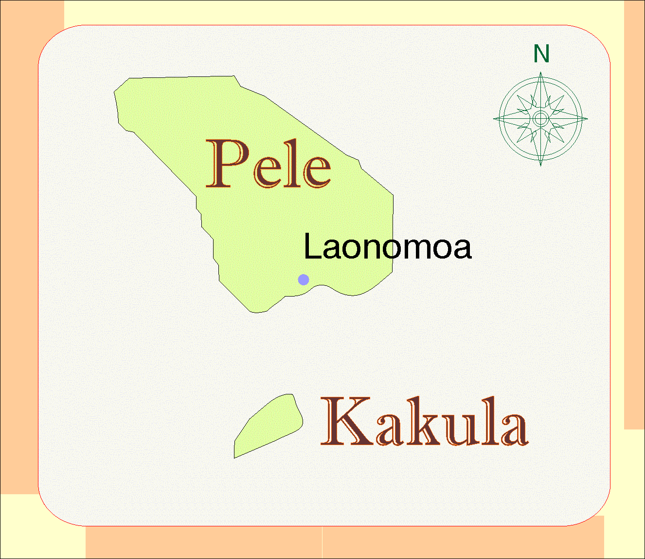 Автор: Галина Йорданова Summary Карта на остров Пеле и остров Какула.